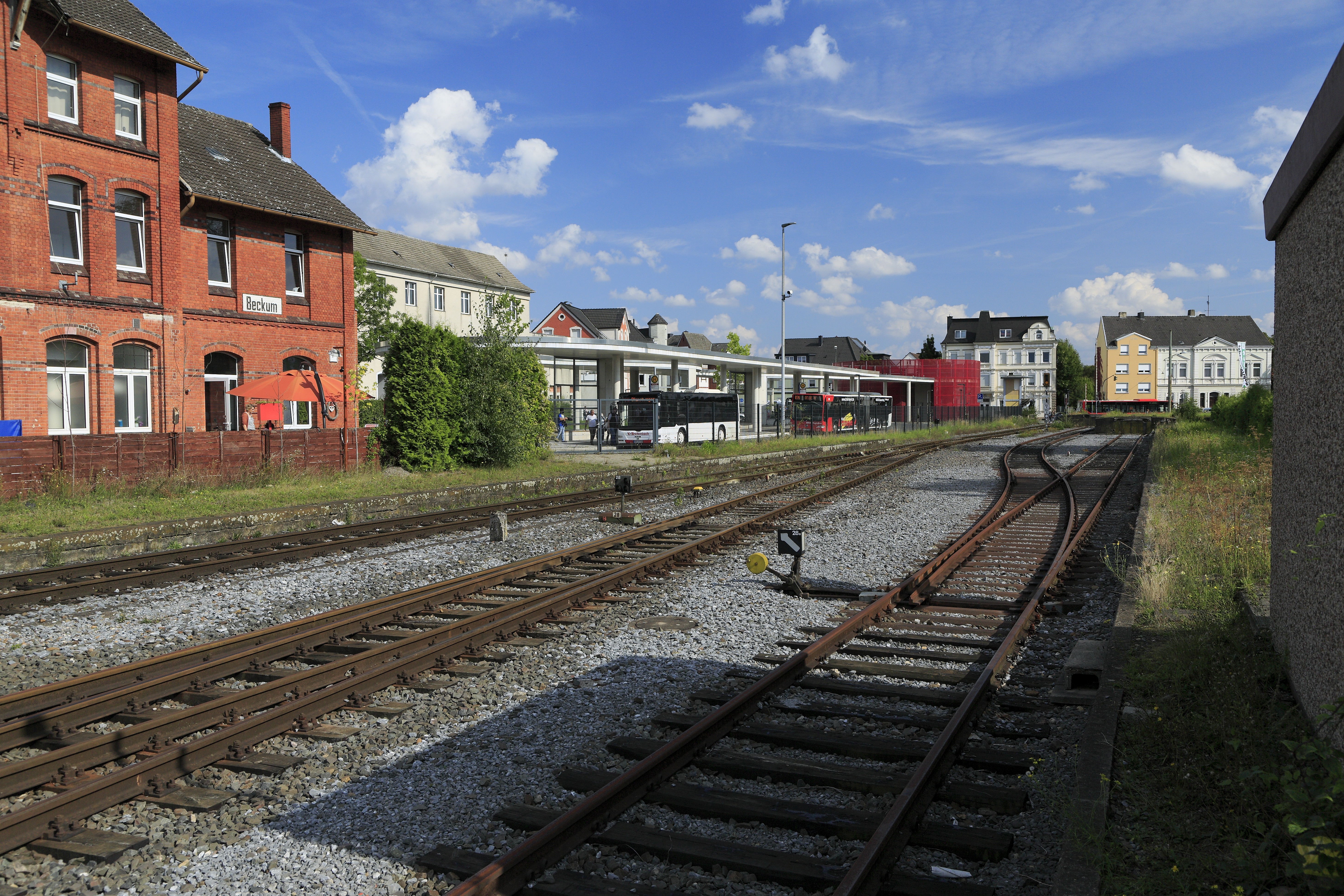 Im Hintergrund rechts liegt der Wegübergang Nordstraße, links davon der Busbahnhof. Seit 1975 wird der Reiseverkehr im Verkehrsgebiet der WLE nur noch mit Bussen betrieben.